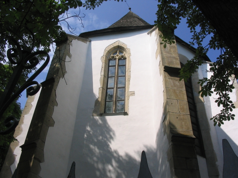 Biserica Reformata Huedin-turnul